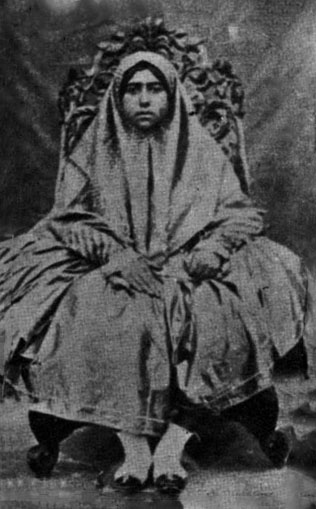 تاج الملوک در جوانی